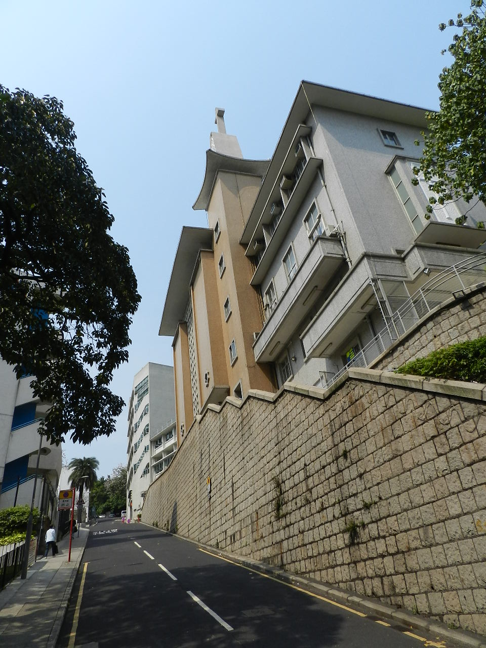 中文（香港）: 循道衛理聯合教會九龍堂, 九龍油麻地加士居道40號